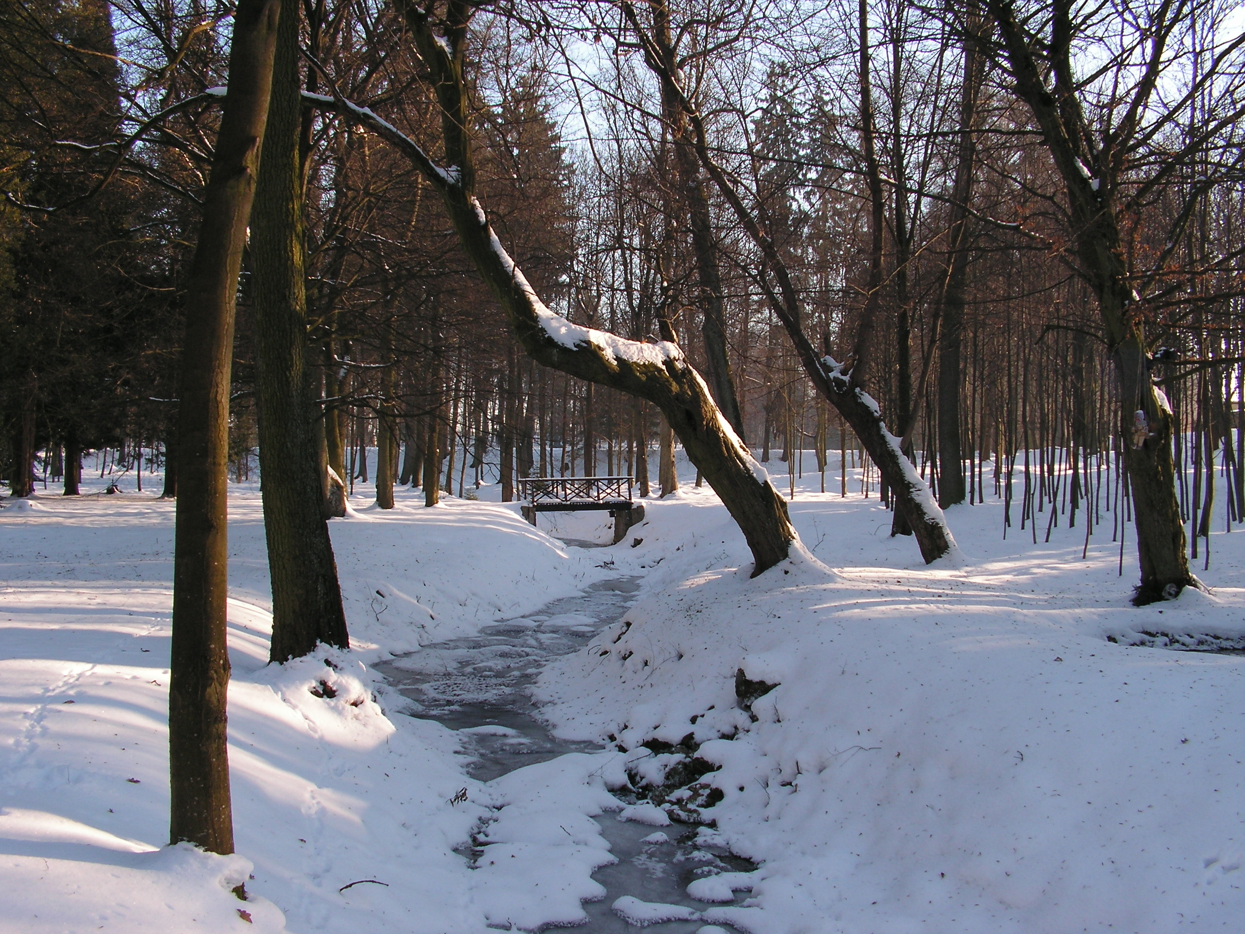 Závidkovický potok v blízkosti světelského zámku